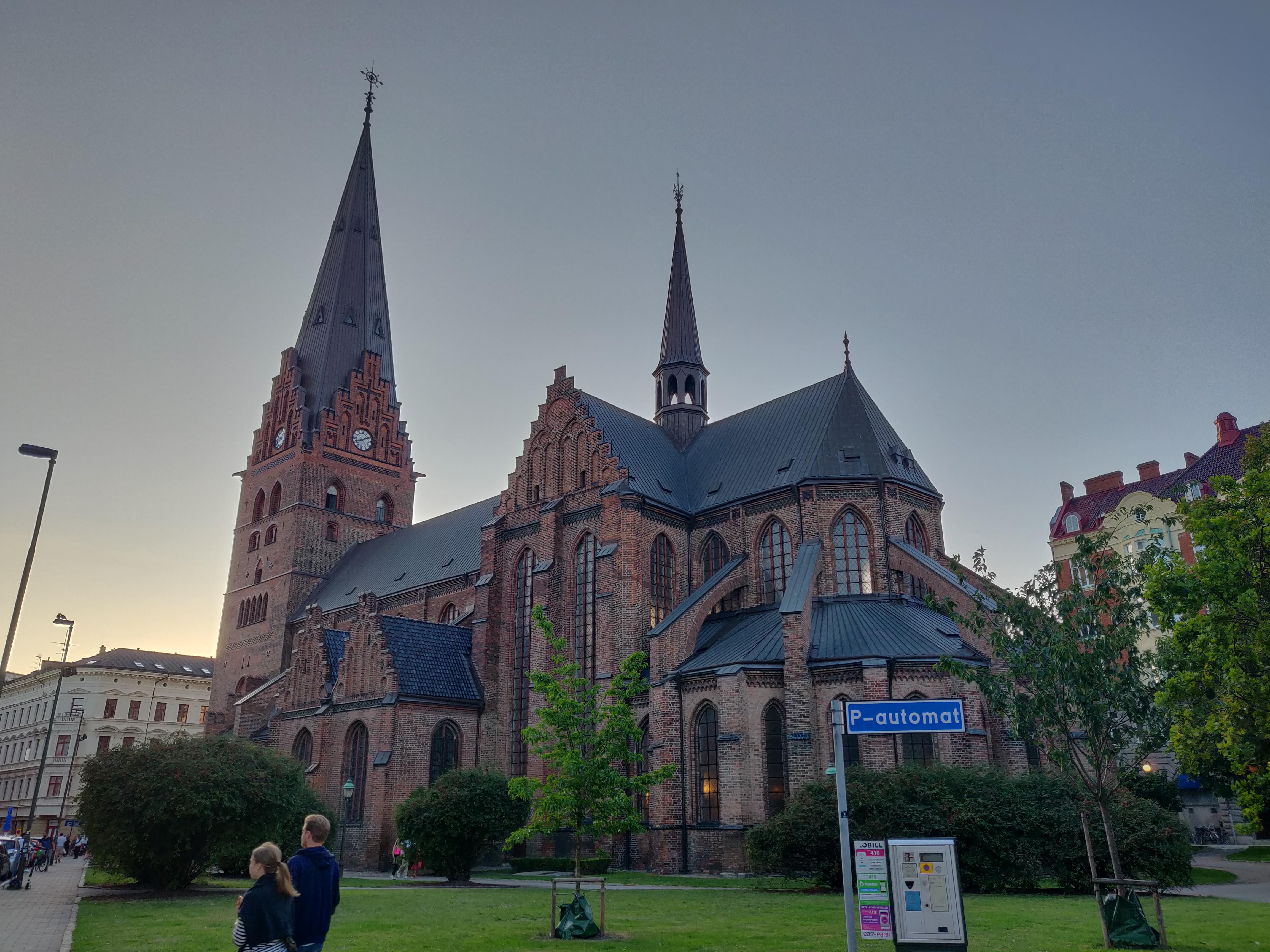 Das Bild zeigt die Sankt-Petri-Kirche in Malmö im August 2019.